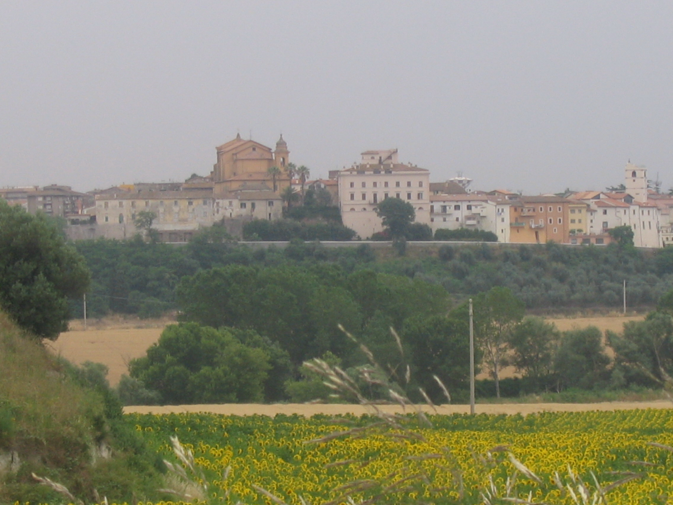 Montalto di Castro, Lazio, Italia